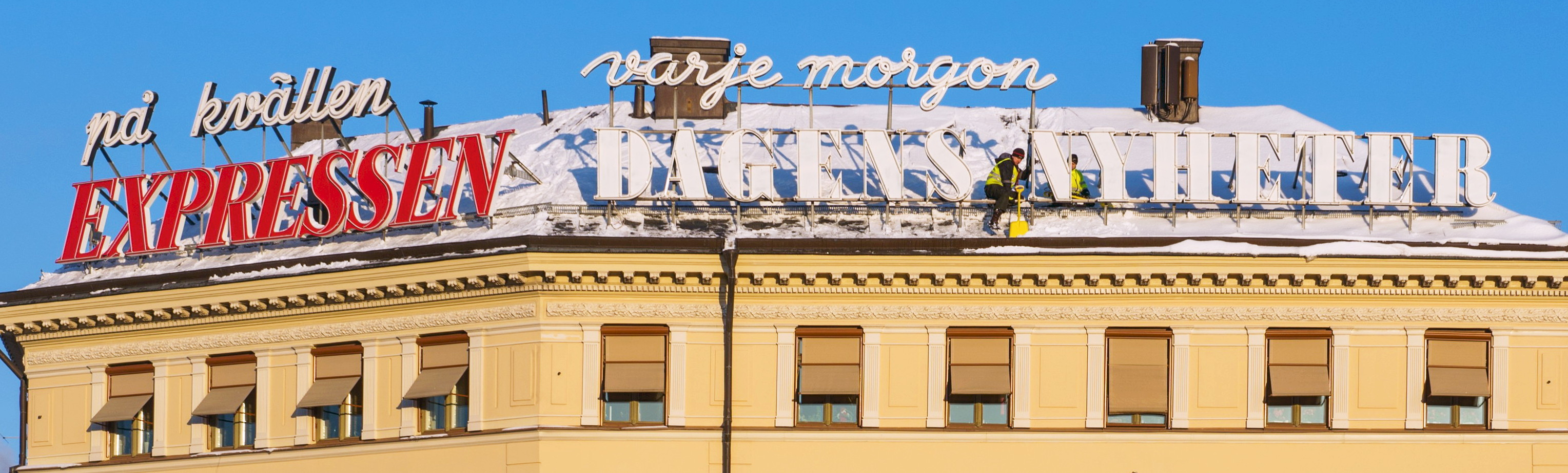 Neonreklam på fastigheten Medusa 1